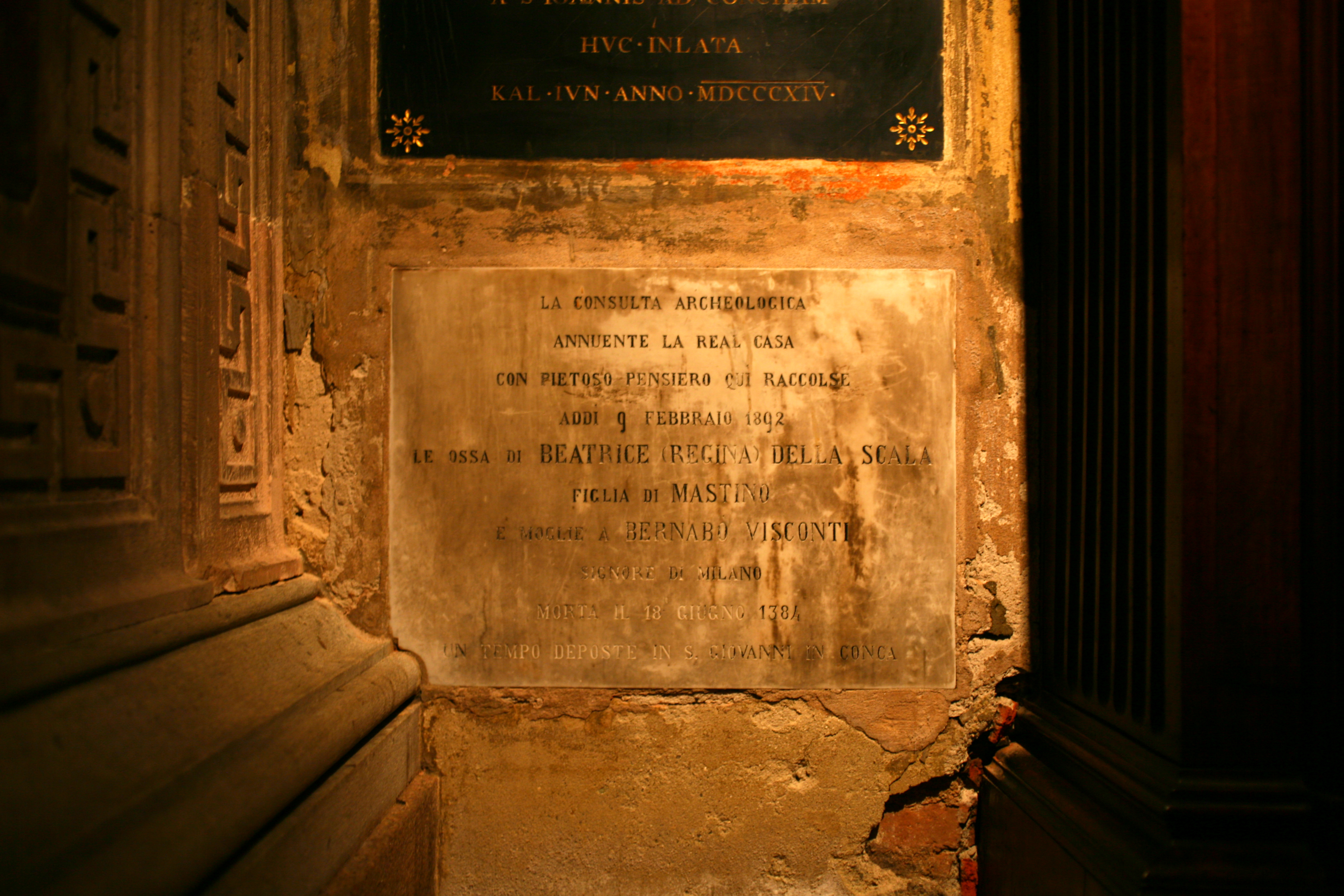 Sepoltura di Beatrice Regina della Scala (1331-1384), moglie di Bernabò Visconti, chiesa di Sant'Alessandro a Milano